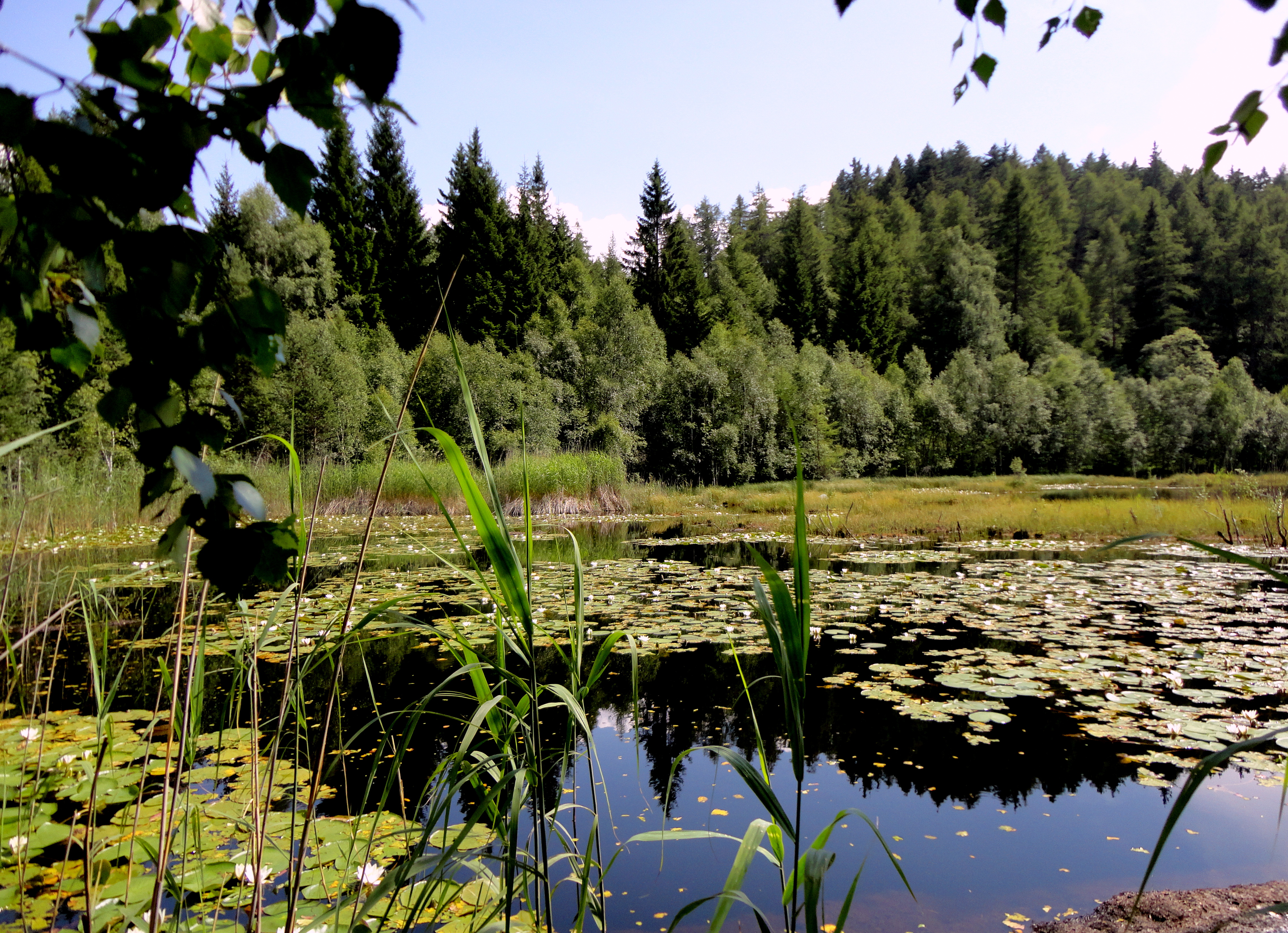 Il biotopo Palù Longa